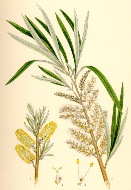 Korgvide (Salix viminalis) gren med hanax och späda blad, gren med utvuxna blad och honax i fruktmognad, hanblomma (3/1), honblomma (3/1).